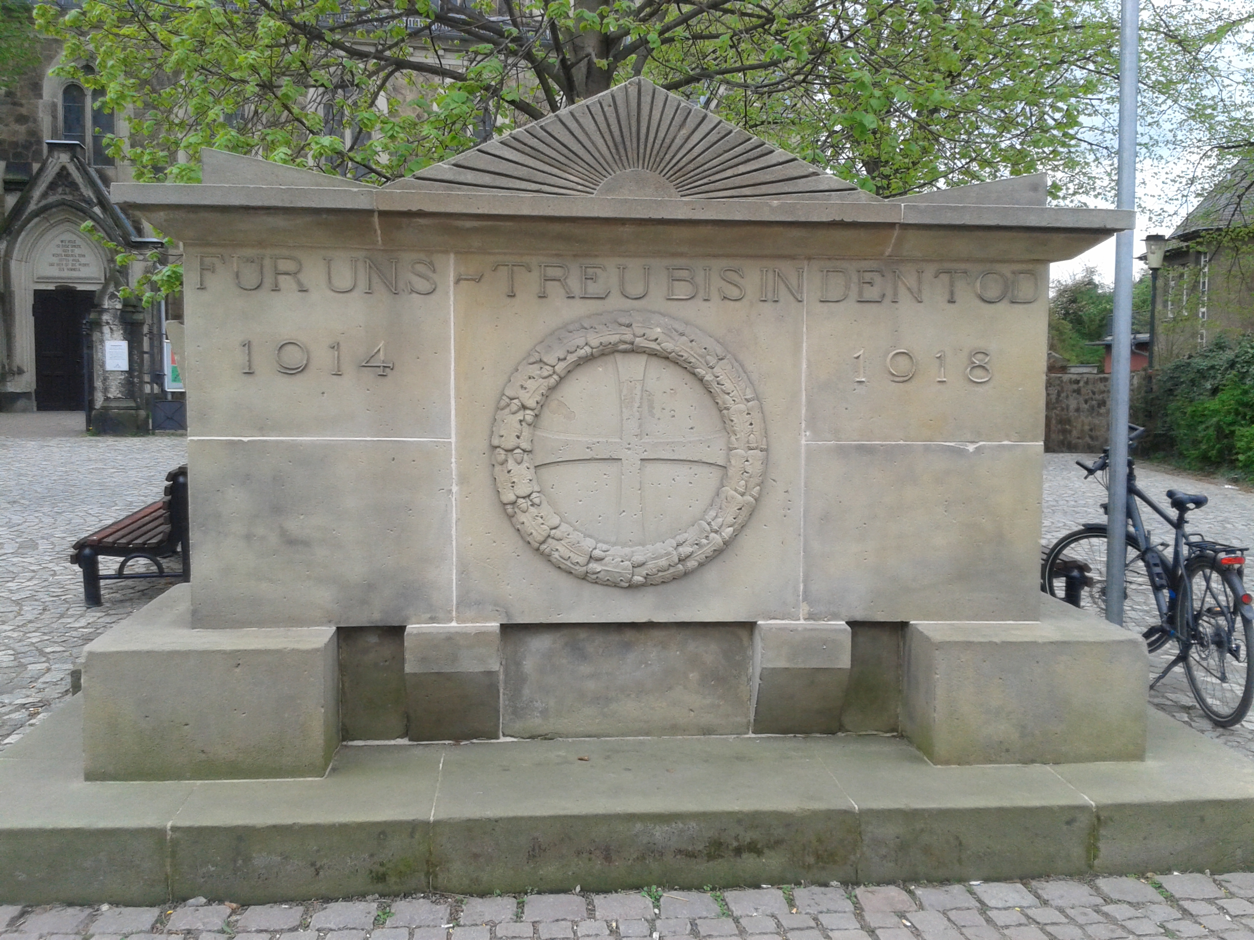 1. Weltkriegs-Denkmal in Radebeul-Kötzschenbroda